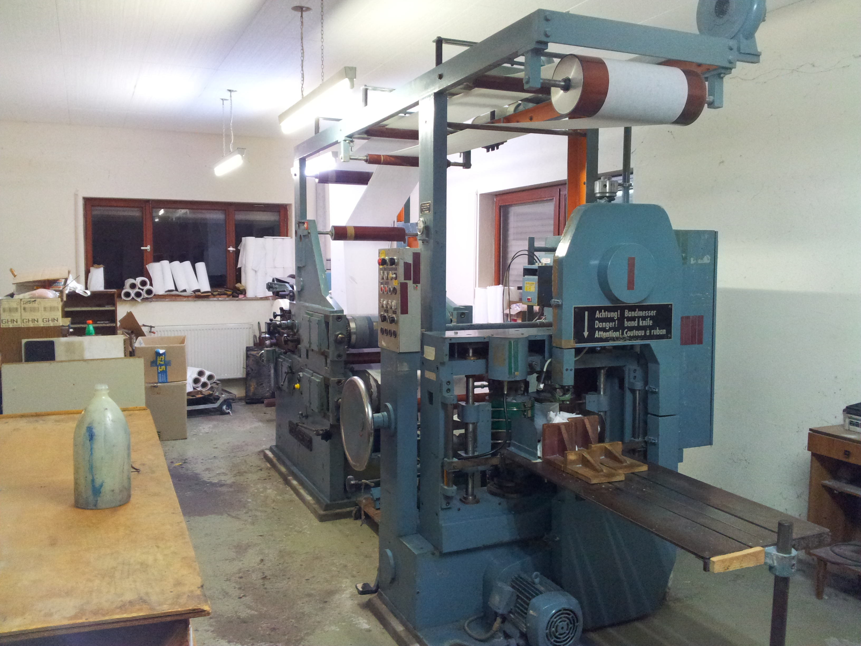 Eine ältere Flexodruckmaschine zur Serviettenherstellung aus den frühen 1970er Jahren.